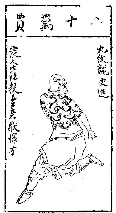 史进。